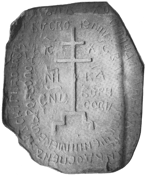 Изображение Рогволодова камня.